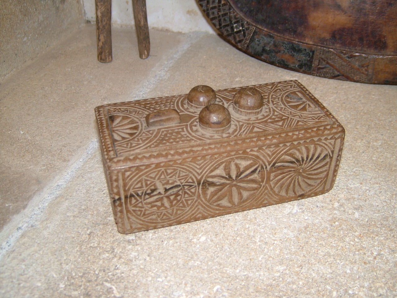 Boite à secret Auvergne